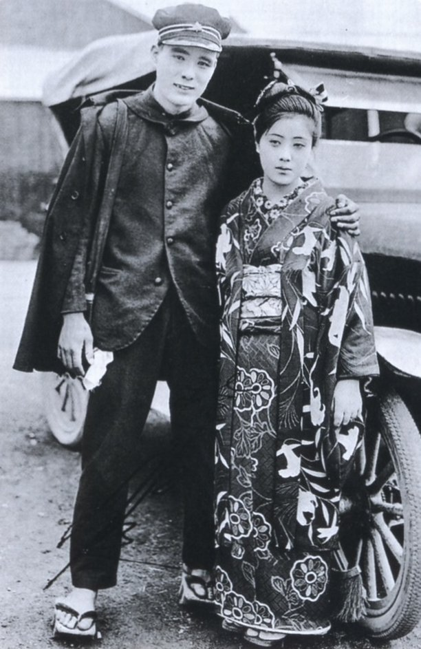 Denmei Suzuki (鈴木伝明) et Kumeko Urabe(浦辺粂子) dans Konjiki yasha (金色夜叉) (1924)